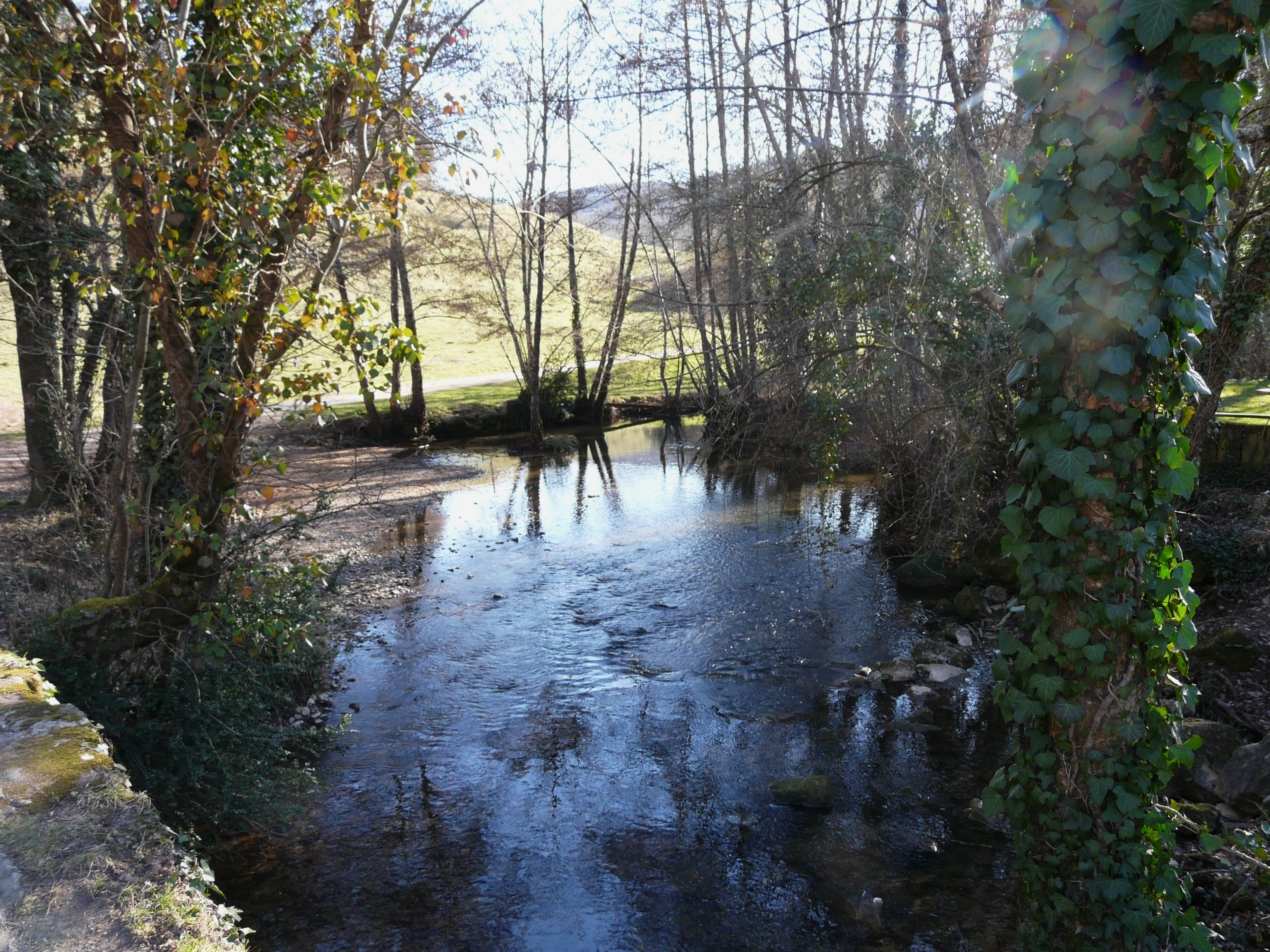 La Couze au lieu-dit la Forge marque la limite entre Lissac-sur-Couze (à gauche) et Chasteaux (à droite), Corrèze, France. Vue prise en direction de l'aval.